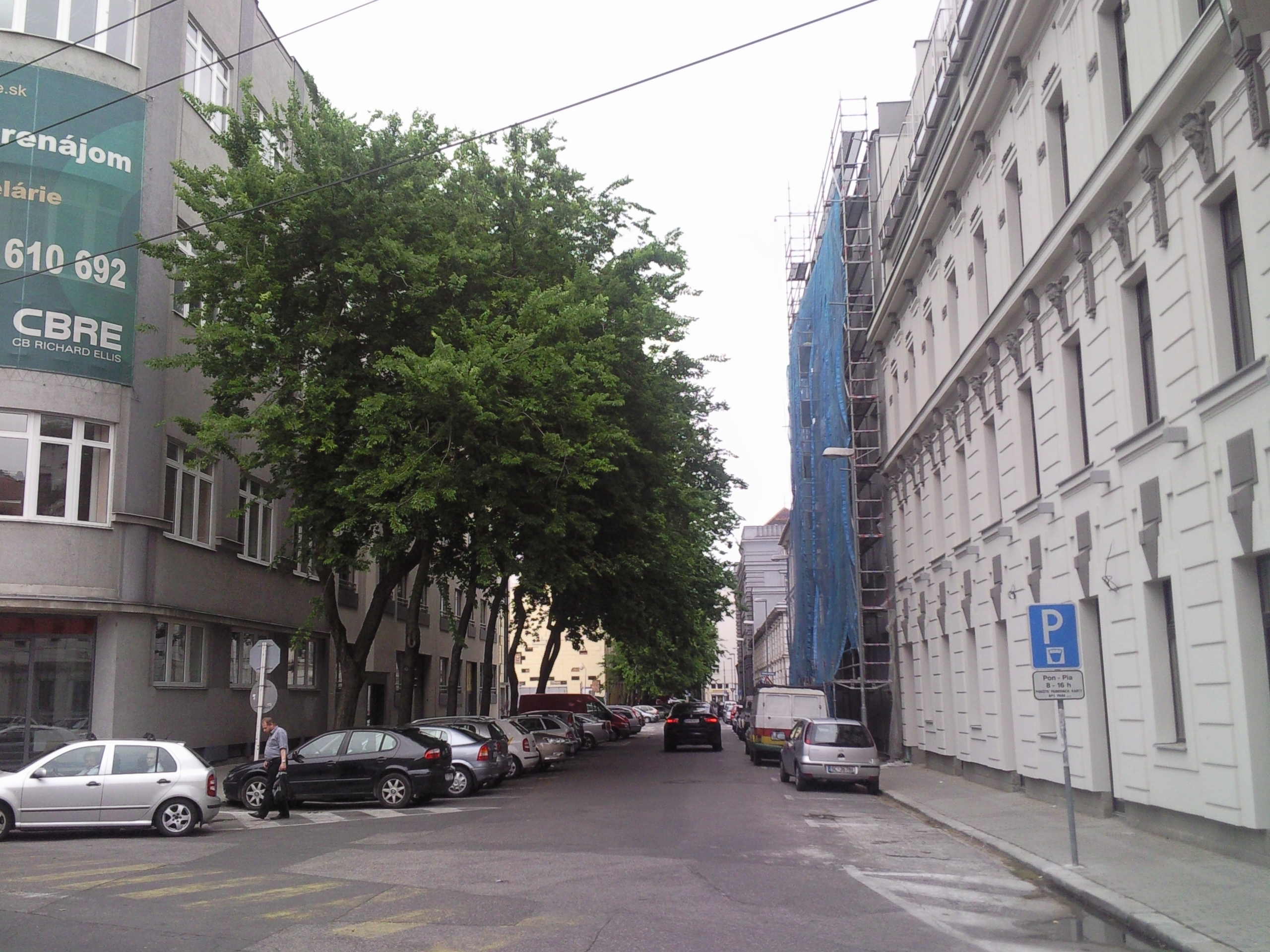 Lazaretská, Bratislava